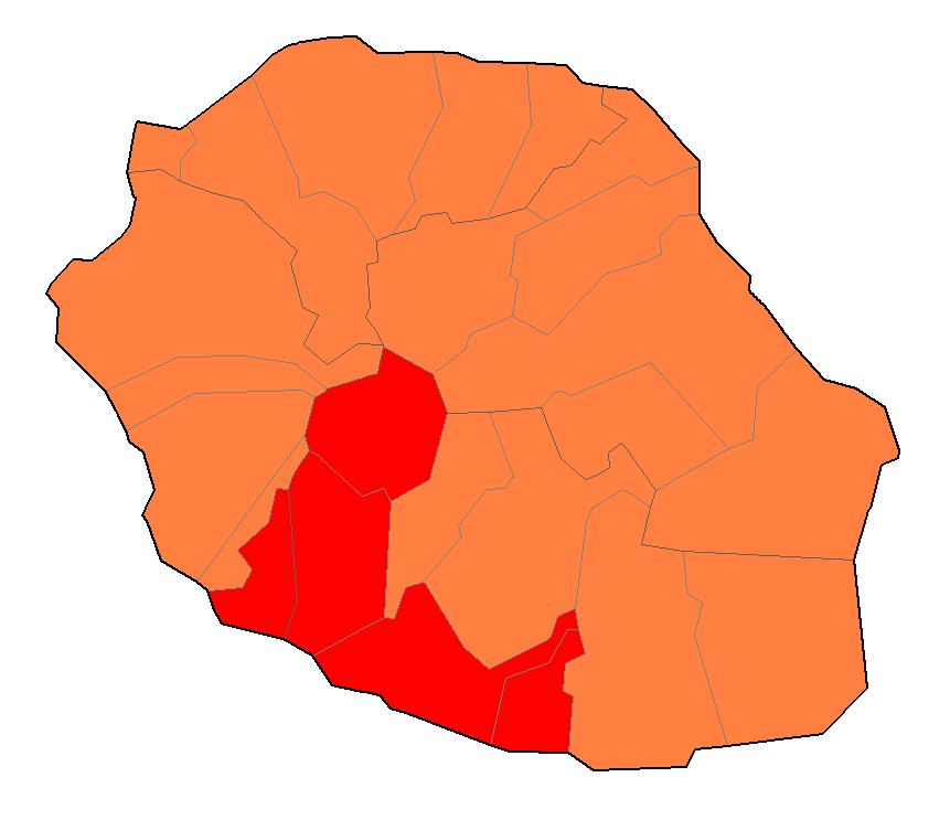 Carte de la Réunion permettant de localiser les communes de la CIVIS.